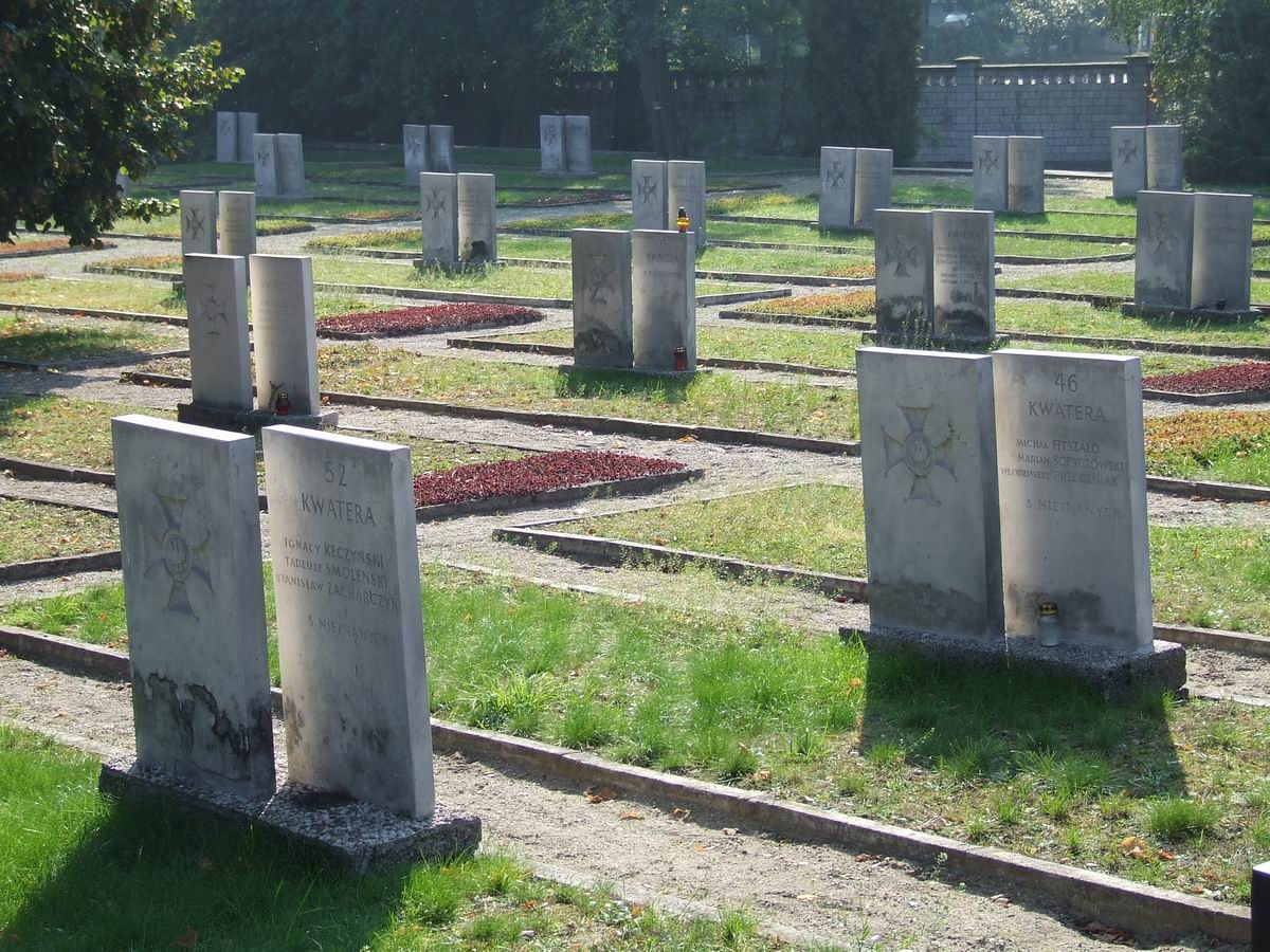 Kwatera 500 żołnierzy 30 pułku Strzelców Kaniowskich z 1939 na Cmentarzu Wawrzyszewskim